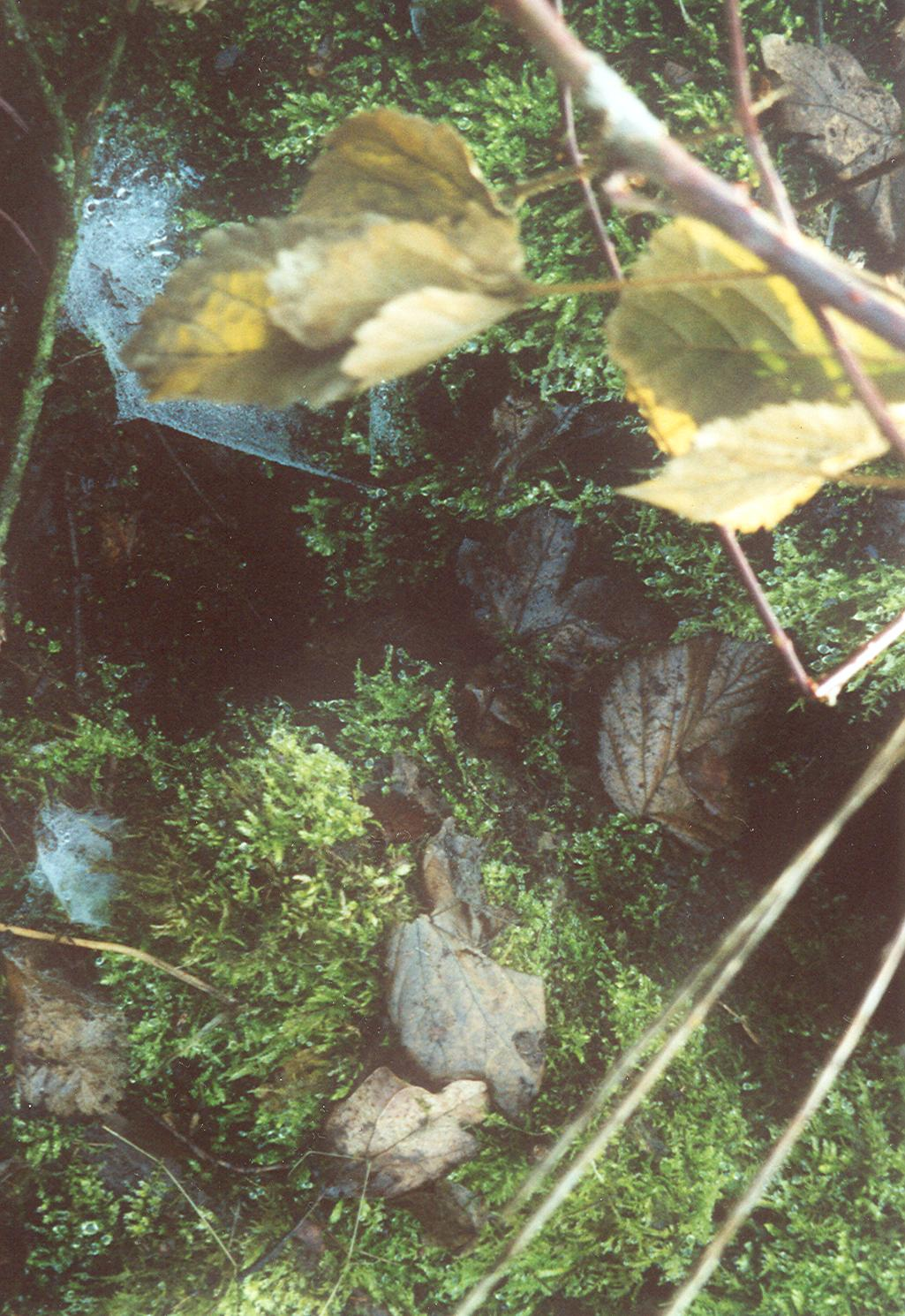 Heißluftquelle auf dem Borec, im Winter bei -20 °C und Schnee aufgenommen